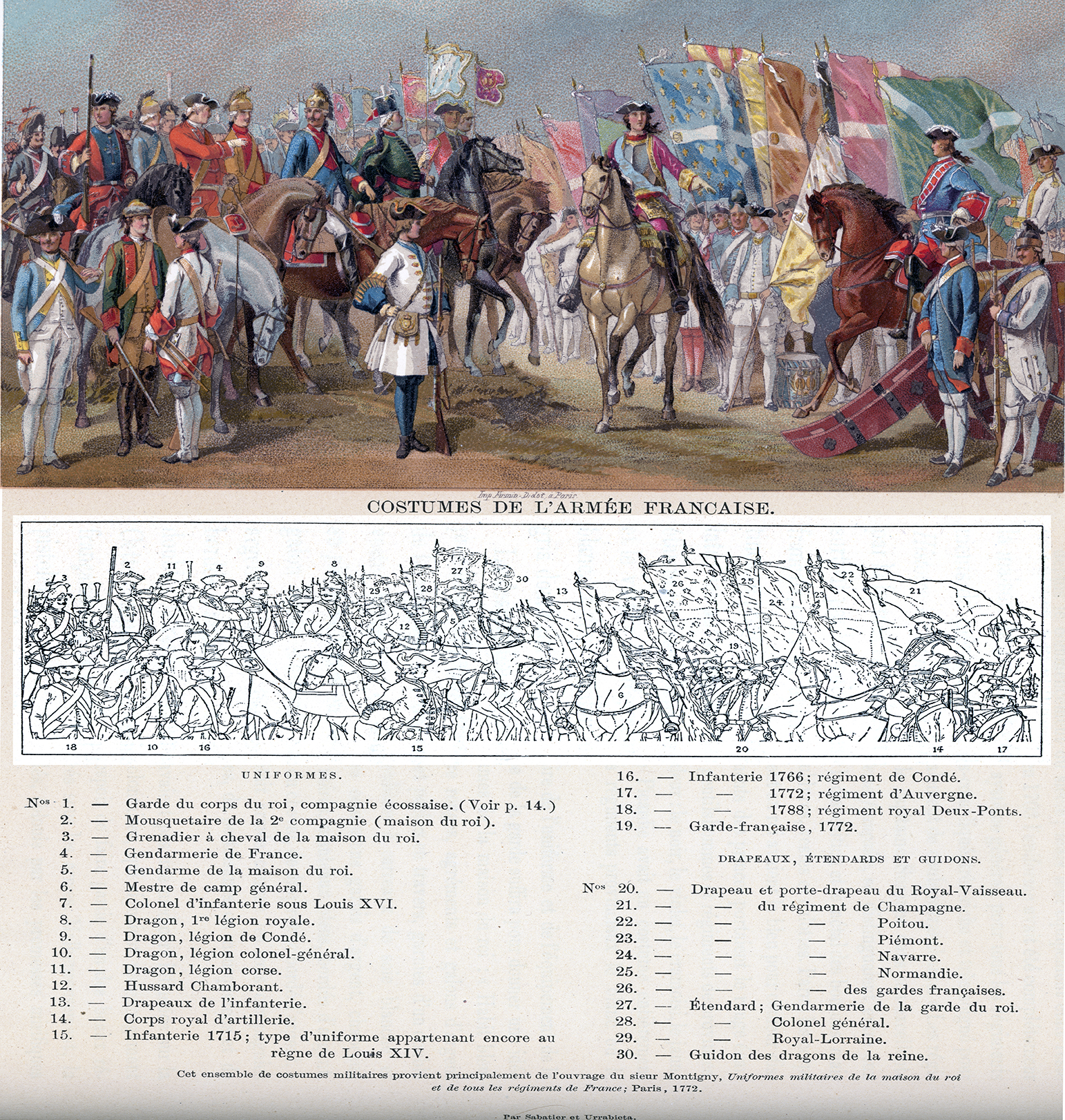 Costumes de l'armée française en 1772 d'après les uniformes militaires par Montigny